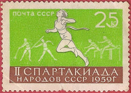 Почтовая марка СССР 1959 года. II летняя спартакиада народов СССР. Номер по каталогу ЦФА — 2336.